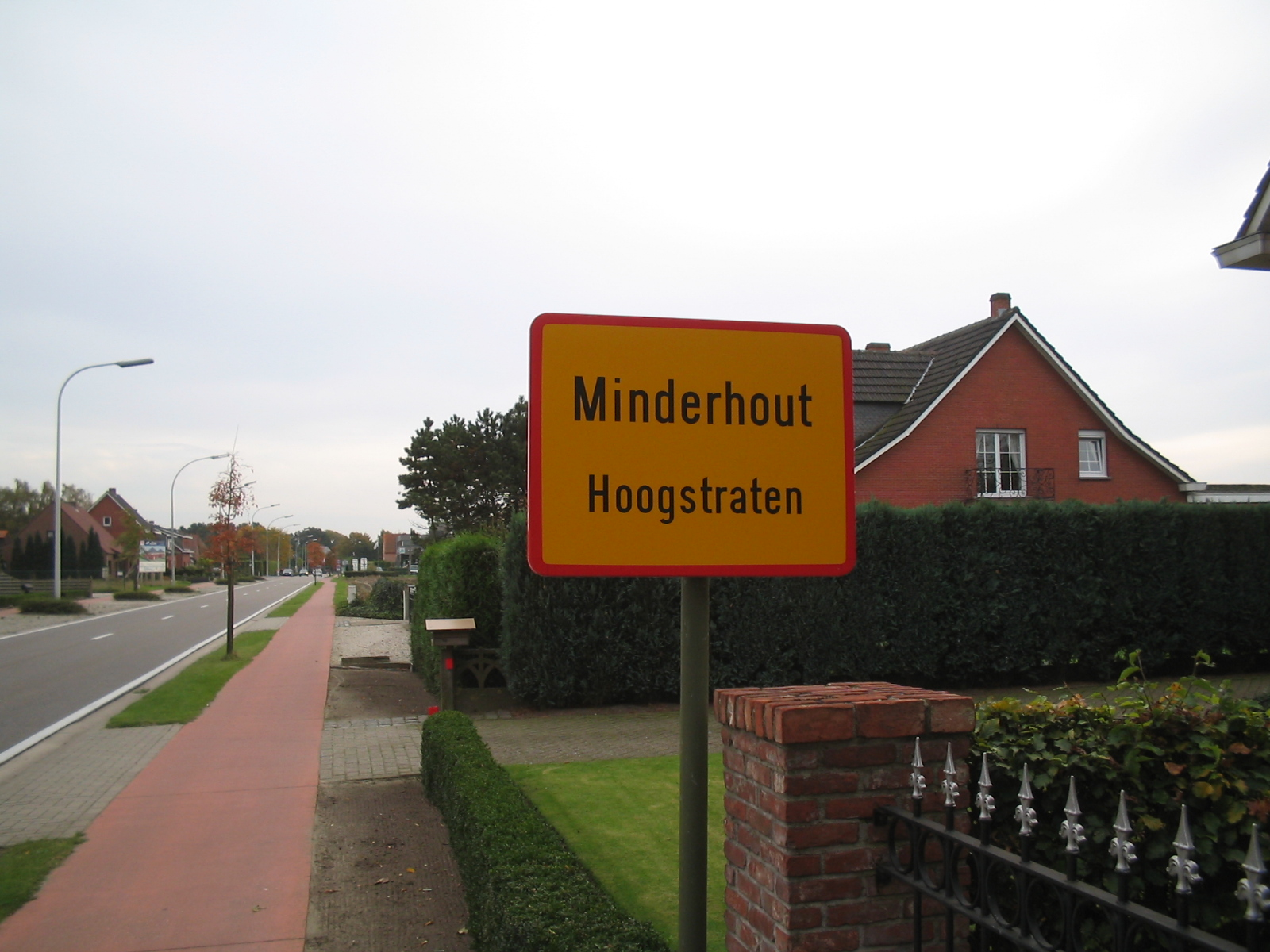 Minderhout, deelgemeente Hoogstraten. Mijn achternaam.